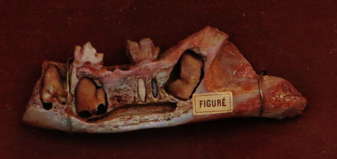 Fossil of Cynohyaenodon, an extinct mammal - Took the photo at Musee d'Histoire Naturelle, Paris